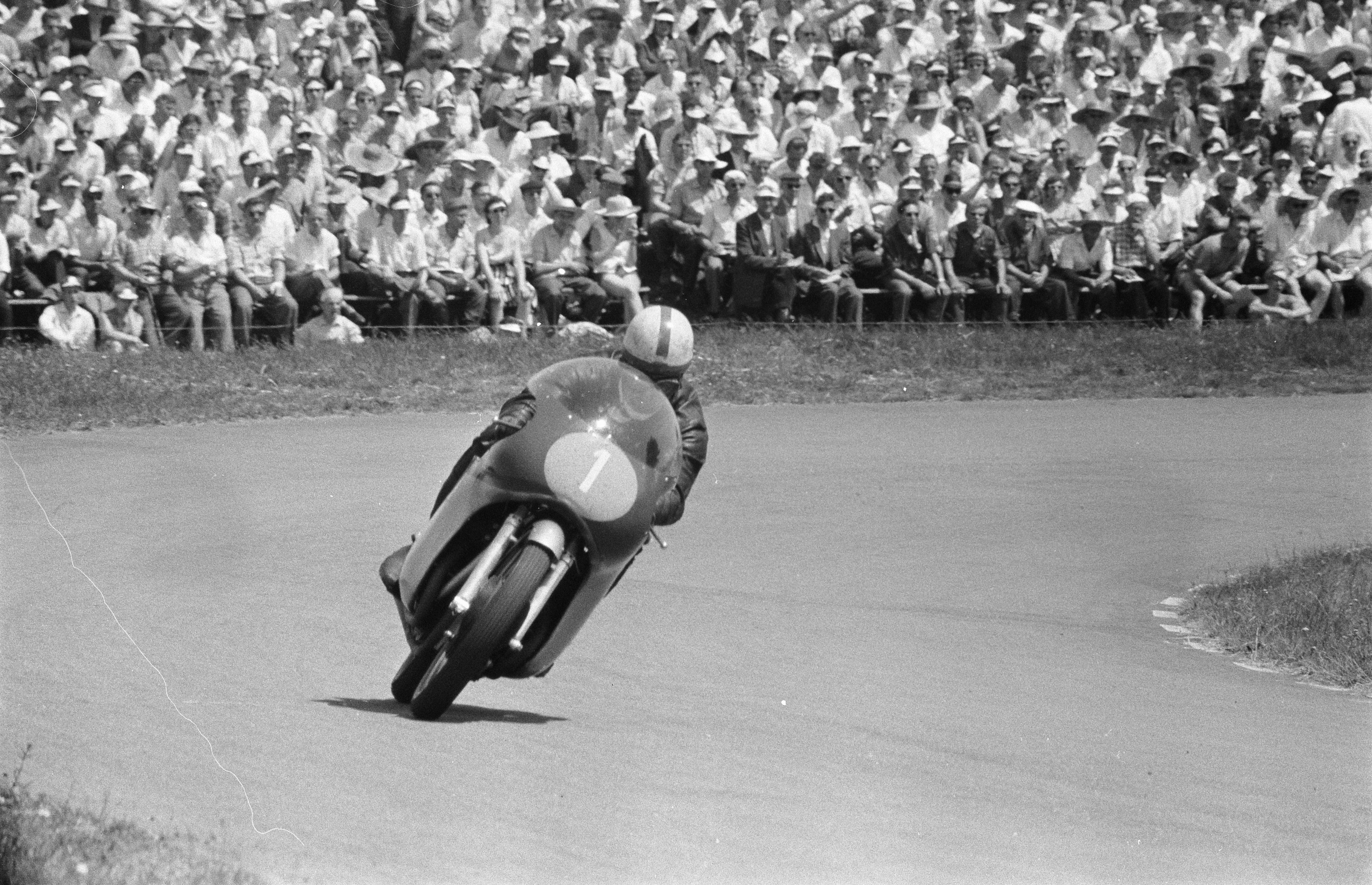 Collectie / Archief : Fotocollectie Anefo Reportage / Serie : TT Assen 1960 Beschrijving : 500cc. John Surtees (voor zijn val) Datum : 26 juni 1960 Locatie : Assen Trefwoorden : motorsport Persoonsnaam : Surtees, John Instellingsnaam : TT Fotograaf : Bilsen, Joop van / Anefo Auteursrechthebbende : Nationaal Archief Materiaalsoort : Negatief (zwart/wit) Nummer archiefinventaris : bekijk toegang 2.24.01.05 Bestanddeelnummer : 911-3657